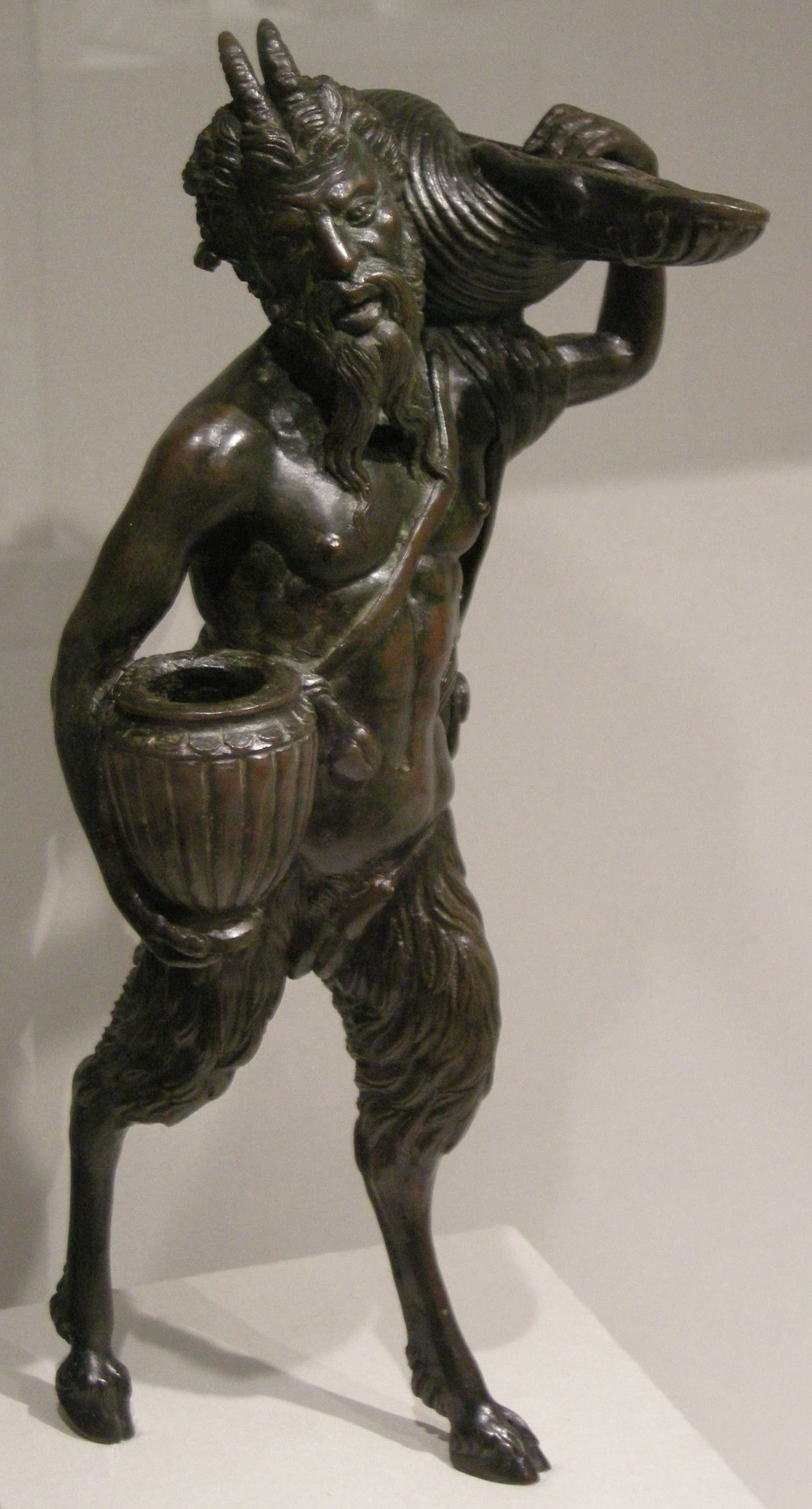 Il riccio (andrea briosco), satiro con calamaio, 1507 circa